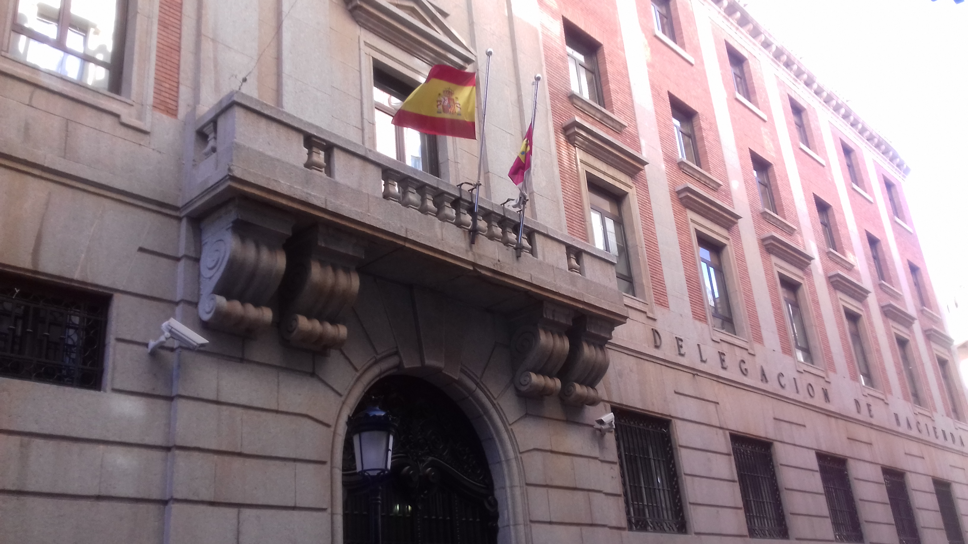 Delegación de Economía y Hacienda del Gobierno de España. Albacete